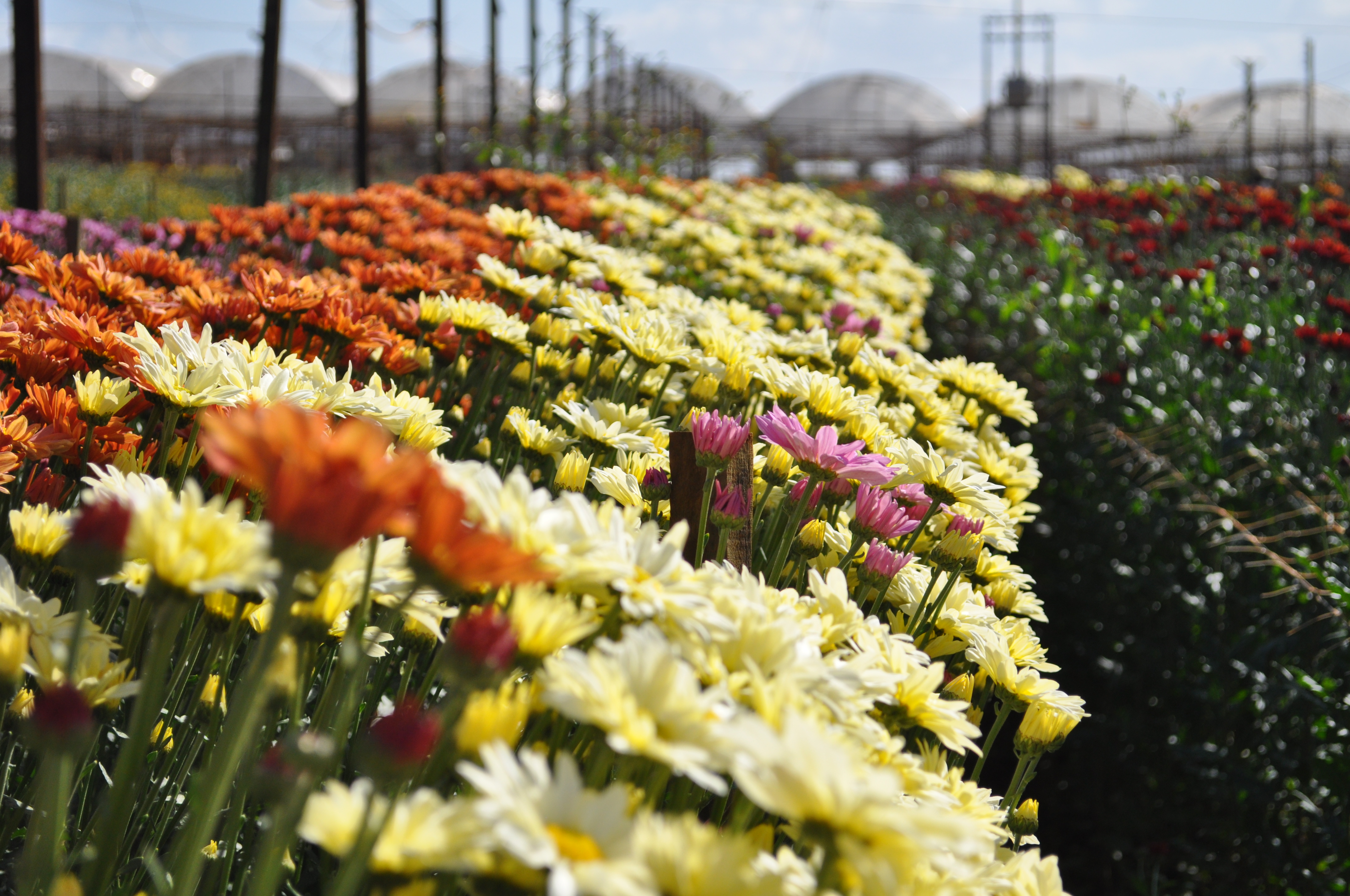 Campo de flores em Holambra 2